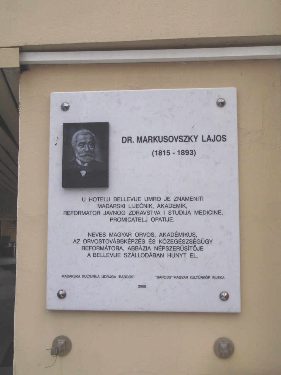 Bahnhof Körmend